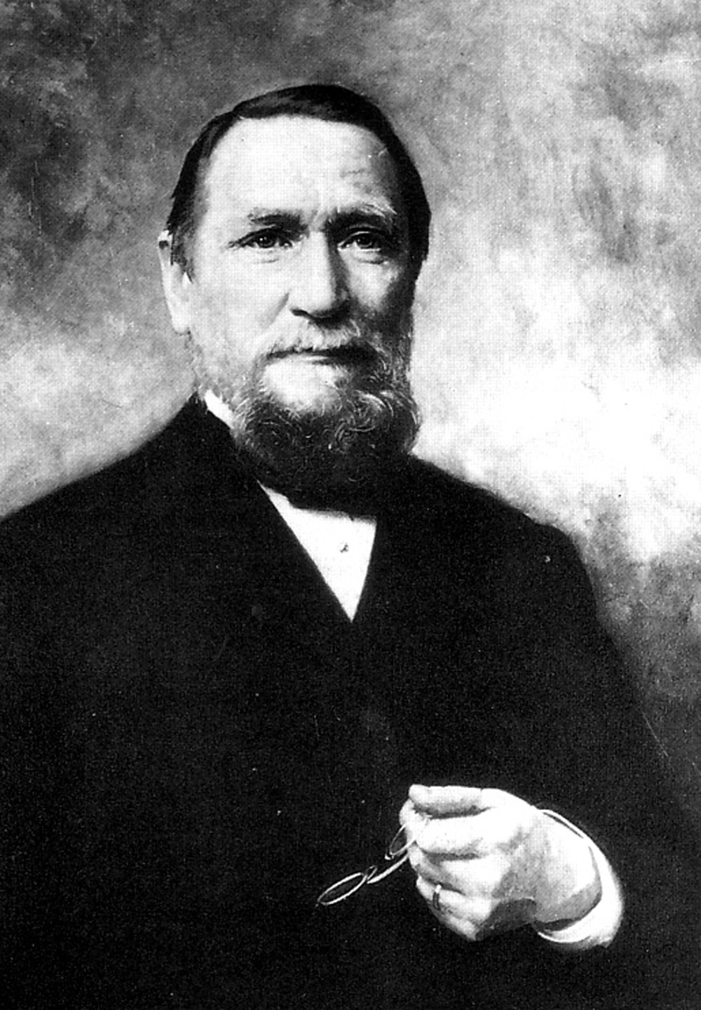 Wilhelm Anton Riedemann, Bremer Kaufmann, Kitbegründer der DAPG